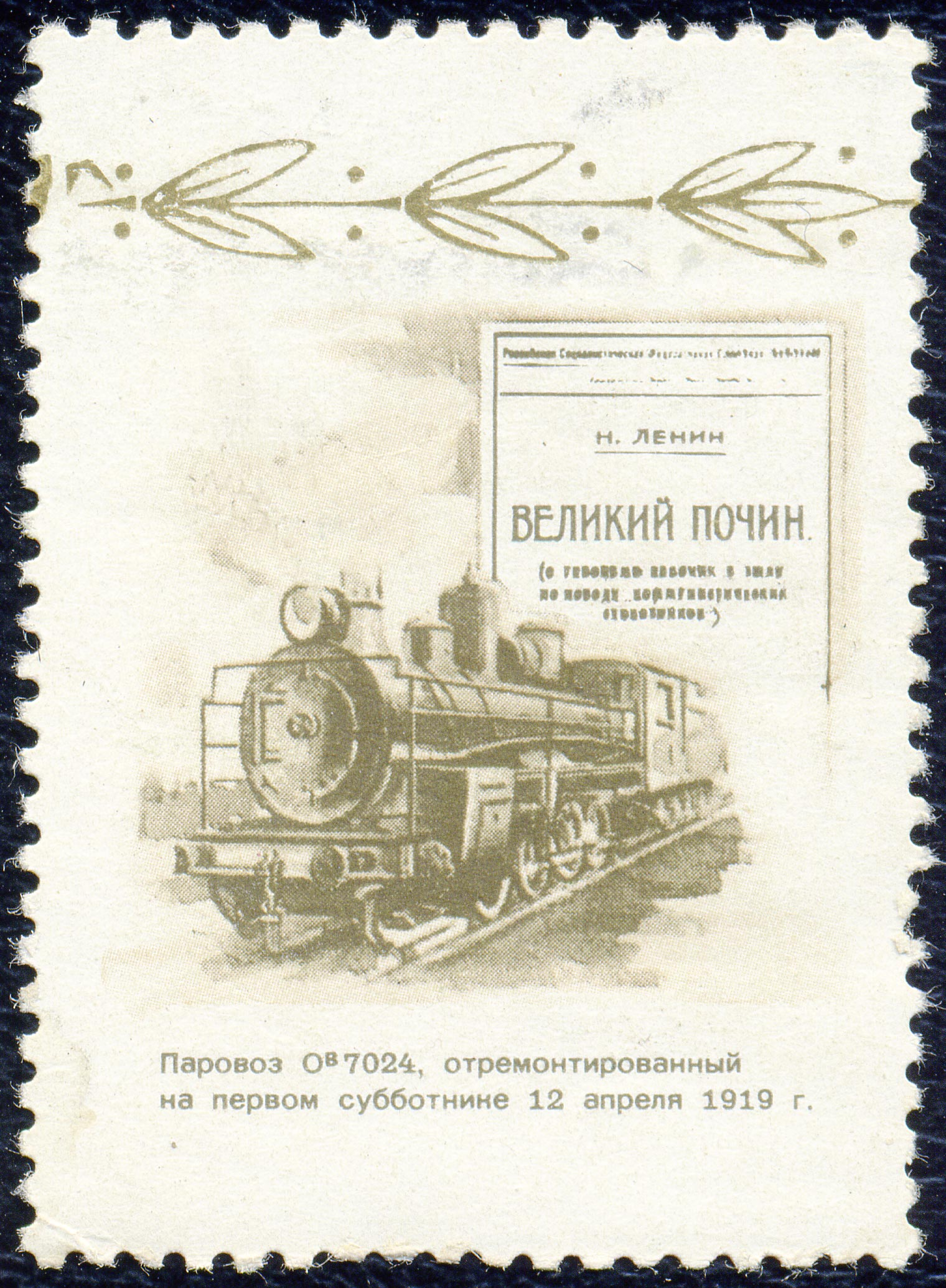 Купон к почтовой марке СССР (?) из юбилейной ленинской серии, 1970. Паровоз Ов7024